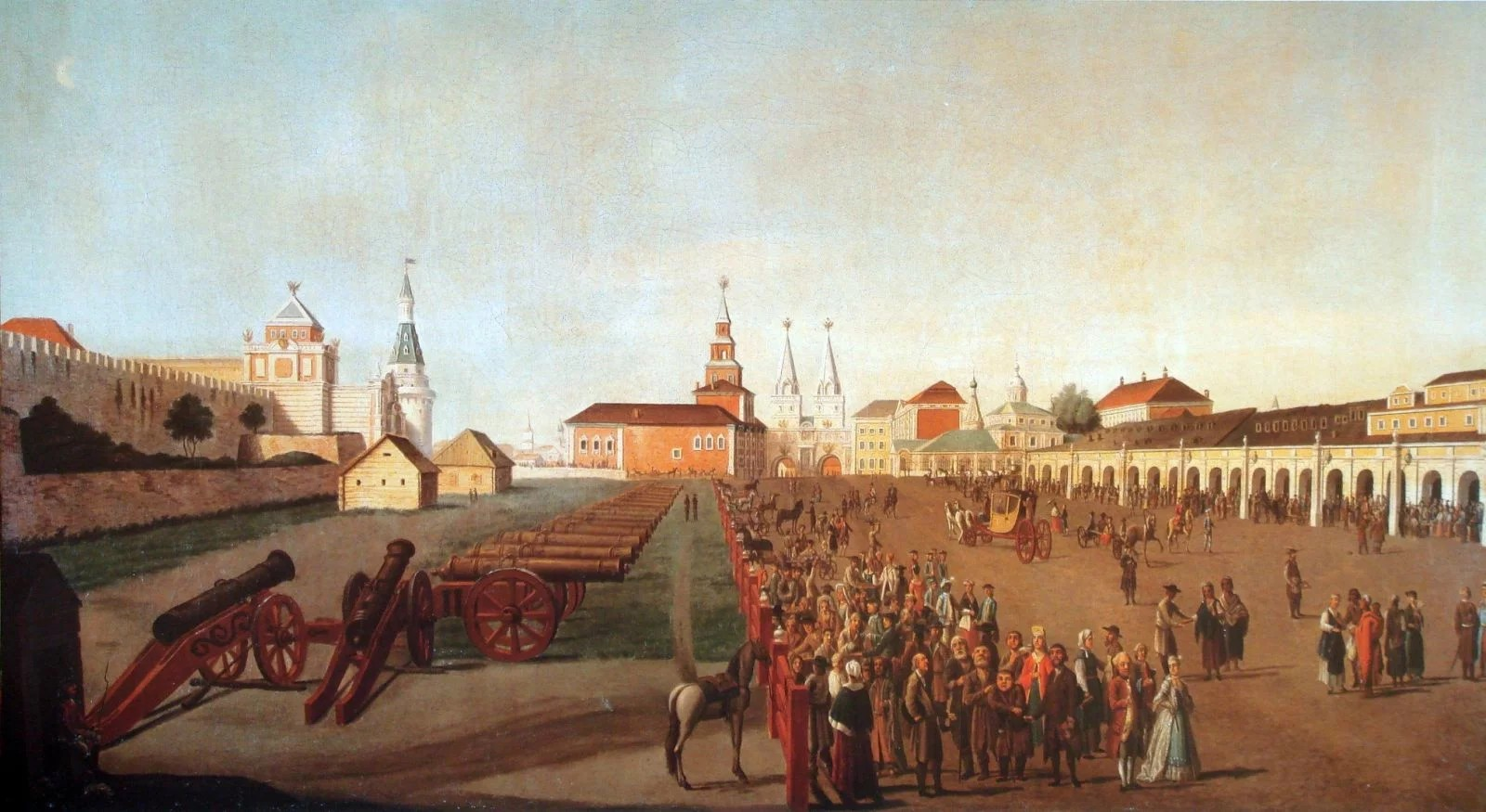 Ф. Гильфердинг. «Красная площадь в Москве». 1780-е. Холст, масло. 71 × 107,5. Государственный Русский музей, Санкт-Петербург.